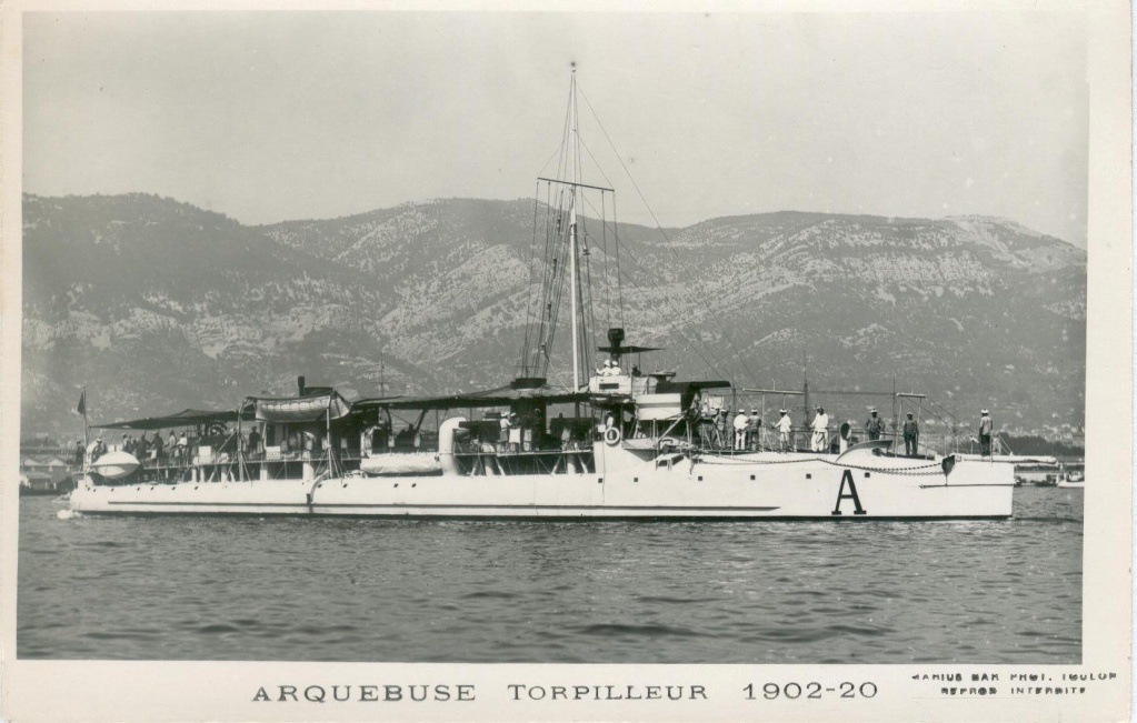 Contre-torpilleur français : Arquebuse